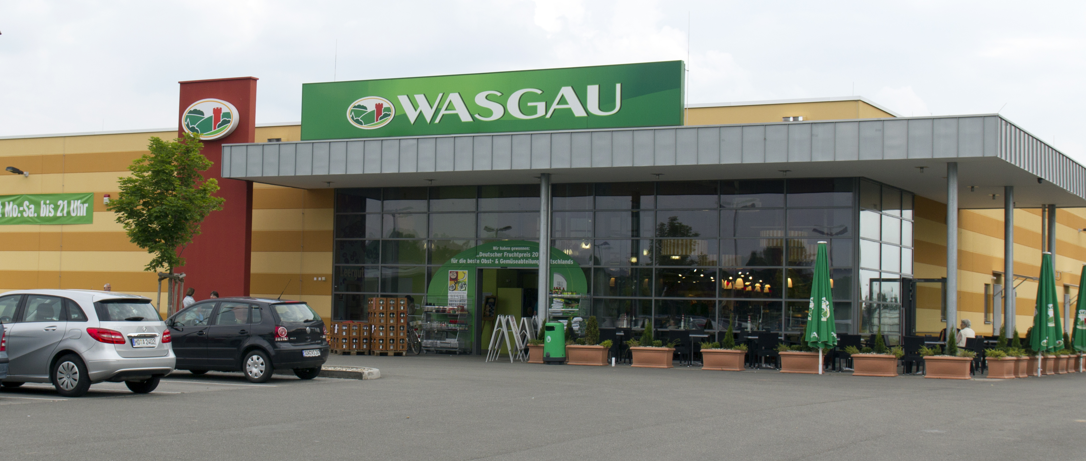 WASGAU-Lebensmittelfiliale in Geinsheim (Neustadt)